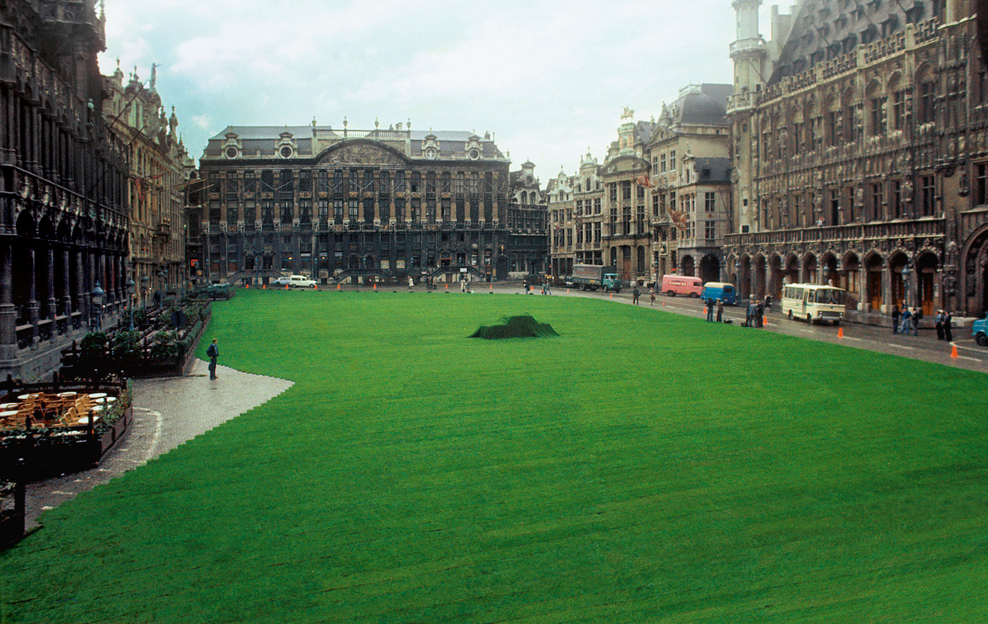 Begrünung